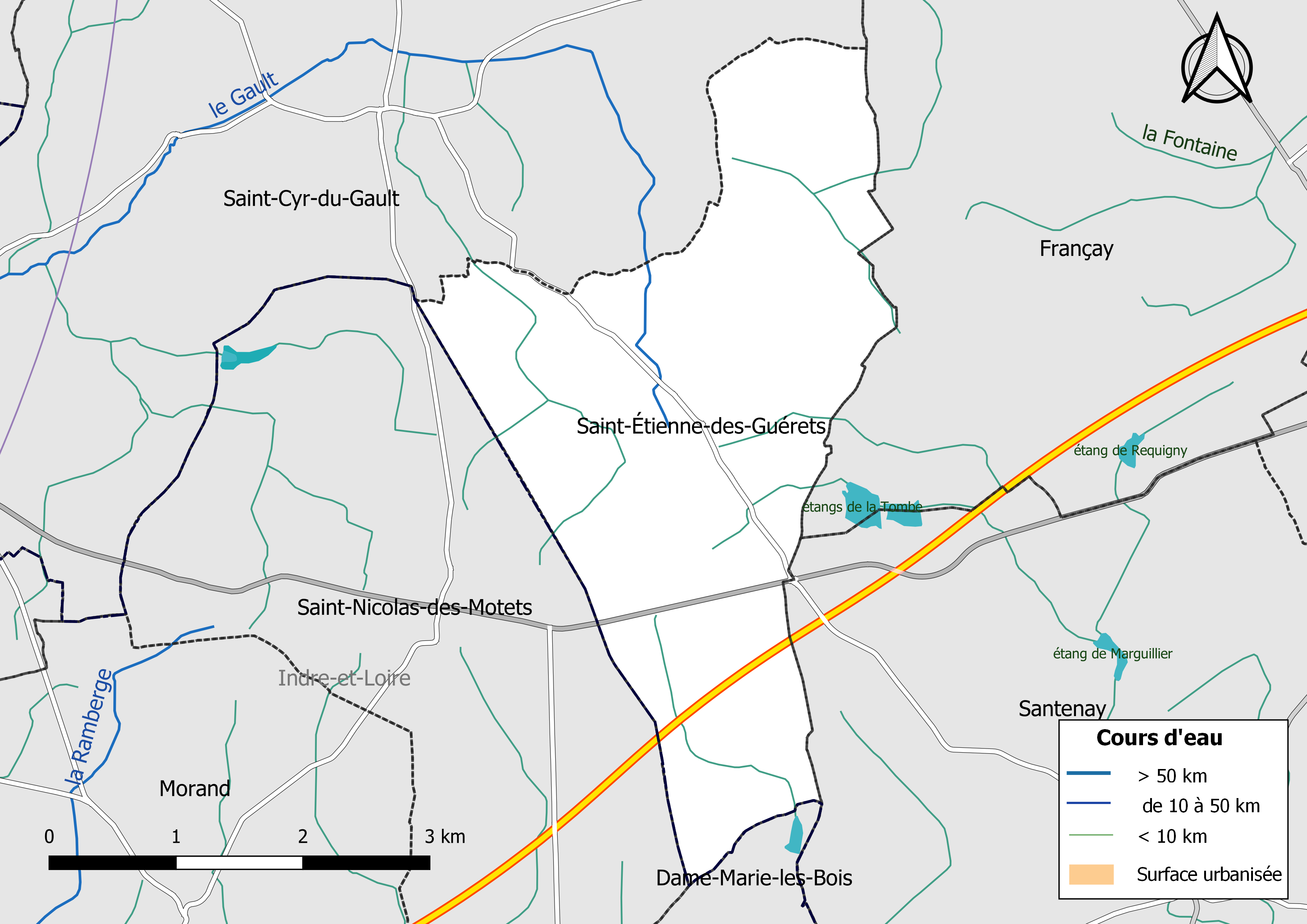 Carte du réseau hydrographique de la commune de Saint-Étienne-des-Guérets (Loir-et-Cher, France).